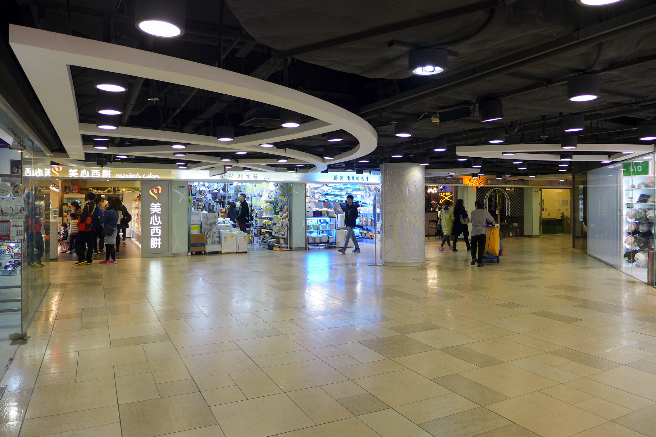 Butterfly Plaza Level 2